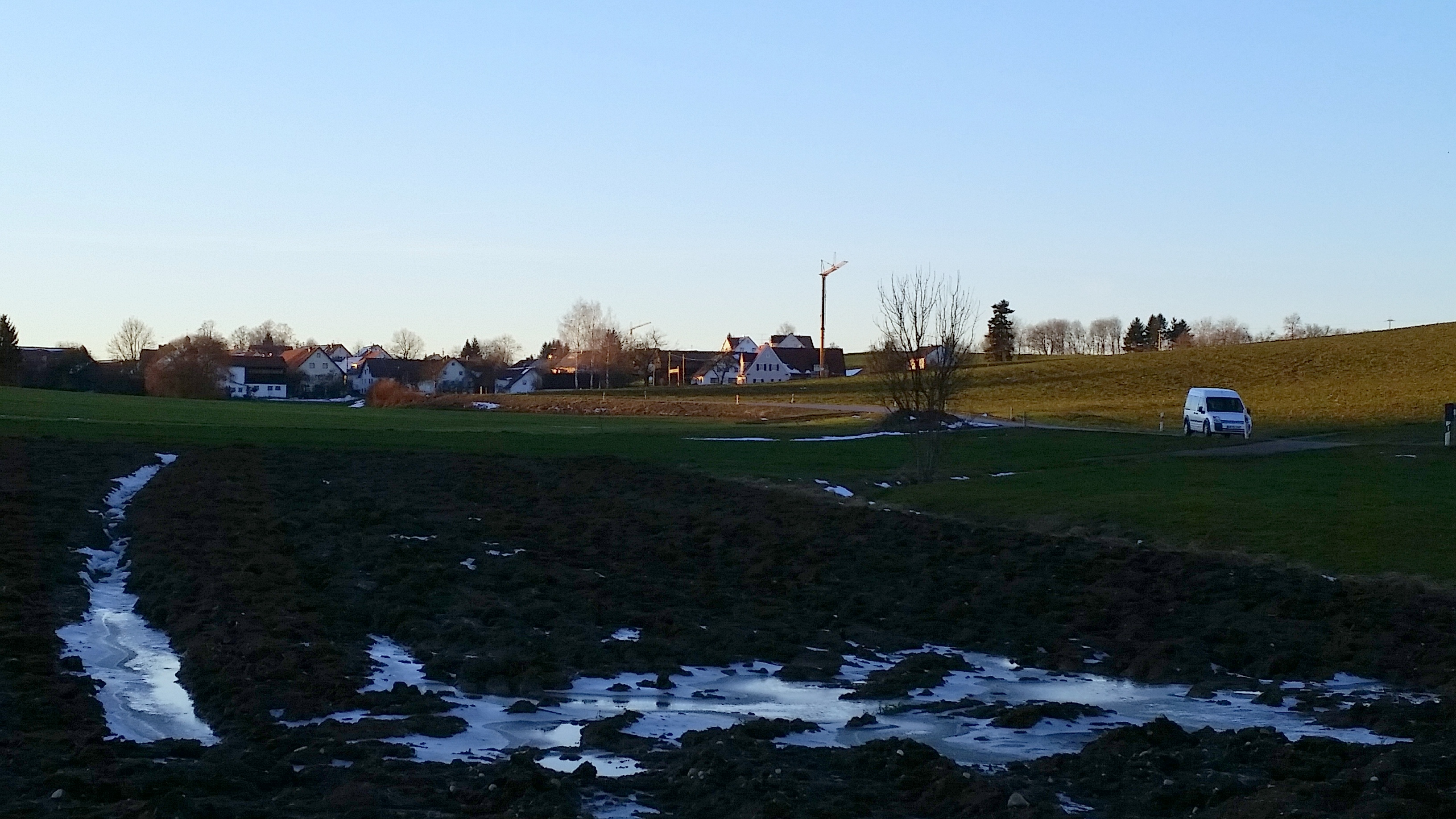 Traunried, Gemeinde Ettringen (Wertach)